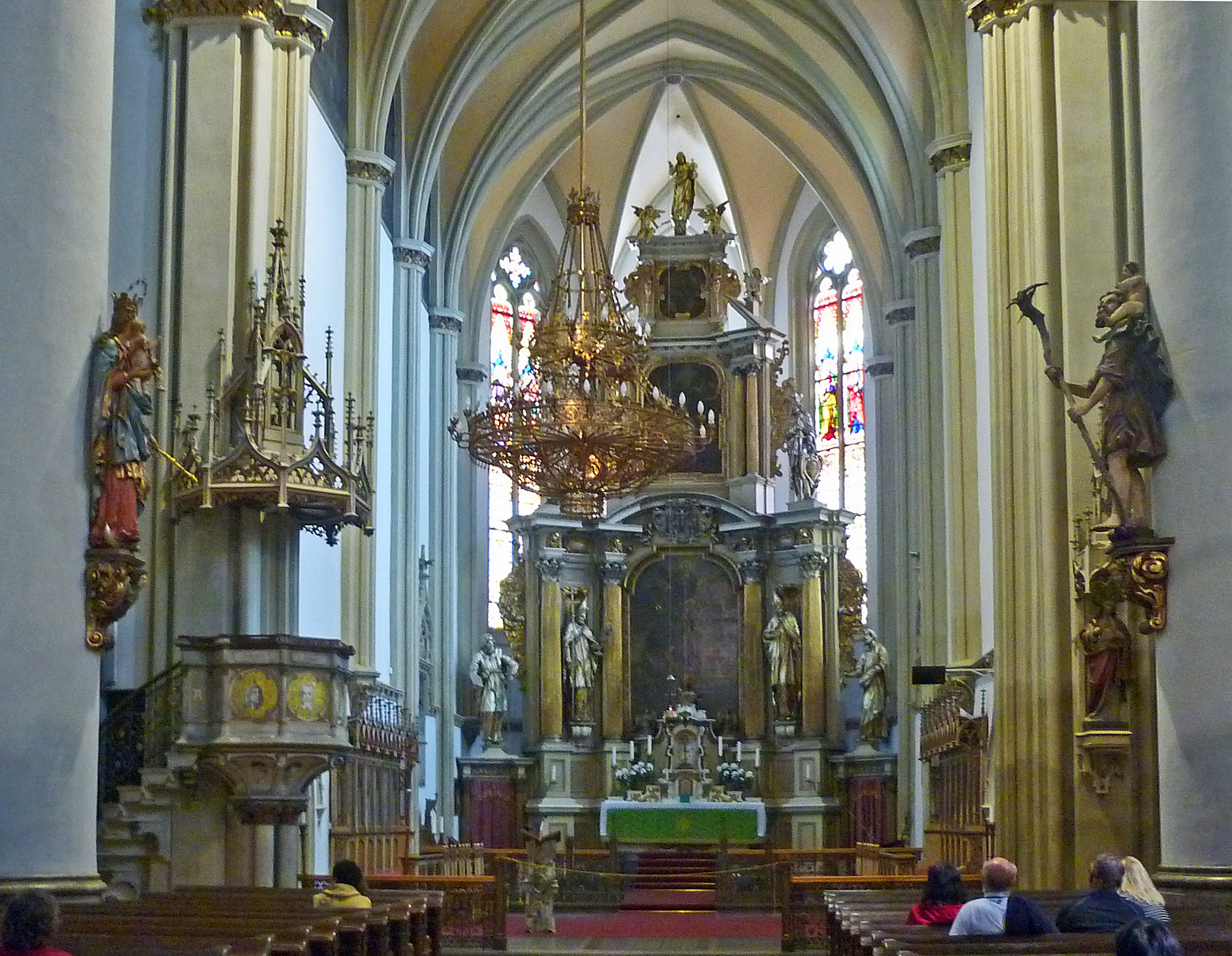 Saaz/Žatec, Dekanatskirche Mariä Himmelfahrt, Blick zum Altarraum